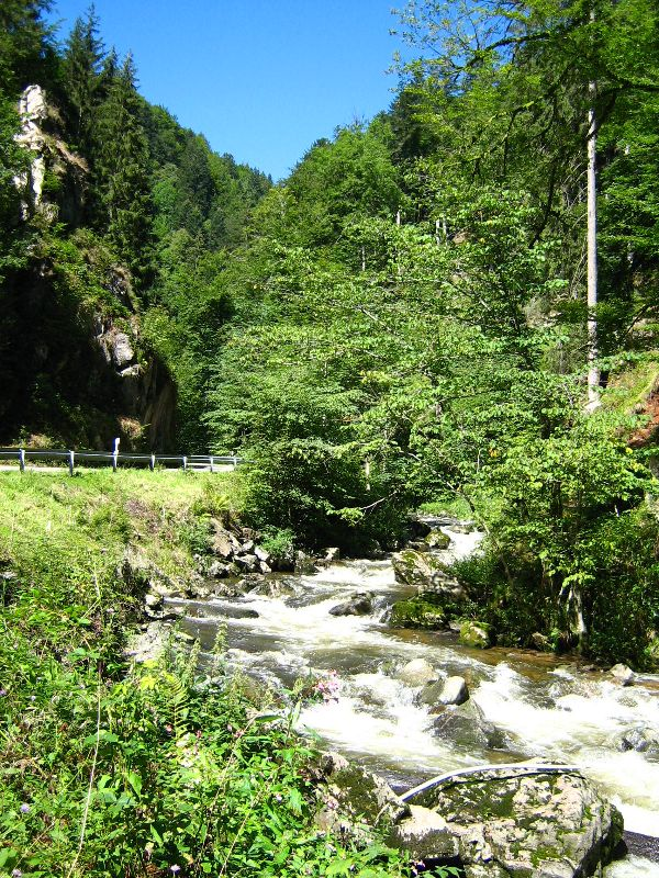 Die Wehra, im Bereich des Gewannes Schanze, etwa auf halber Länge des Flussverlaufes.